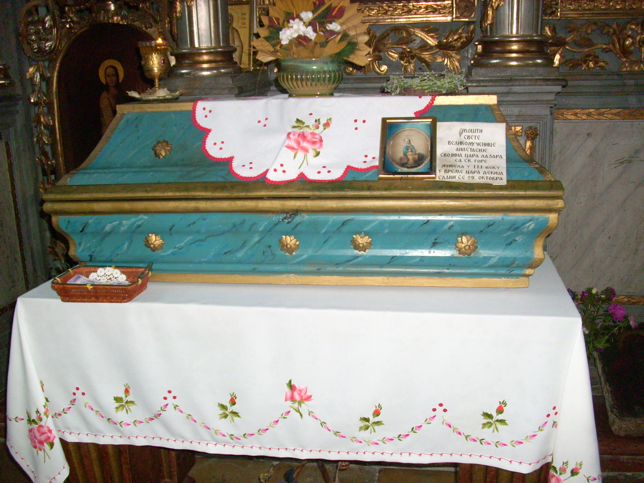 Манастир Врдник, познат и као Мала Раваница, један је од манастира на Фрушкој гори.